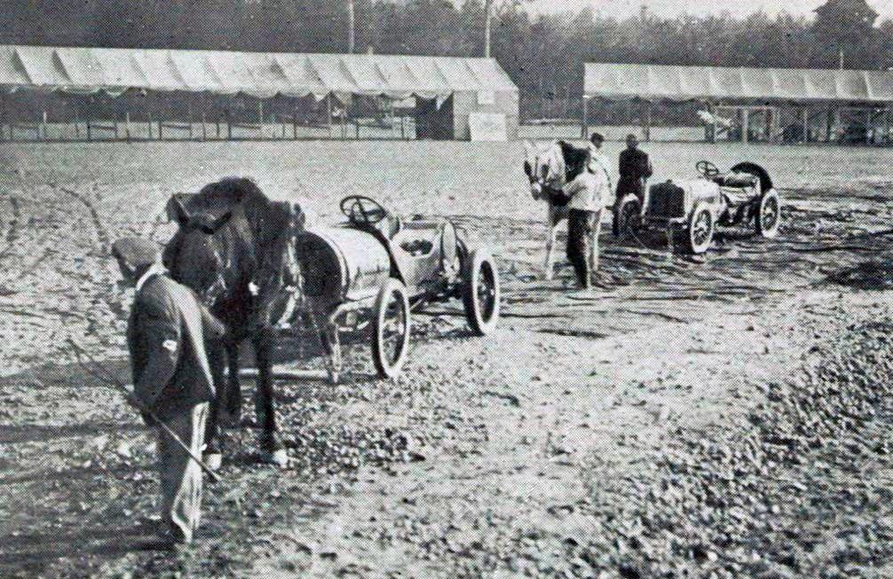 Grand Prix de l'ACF 1906, des chevaux pour emmener les voitures au départ, sans les conduire.